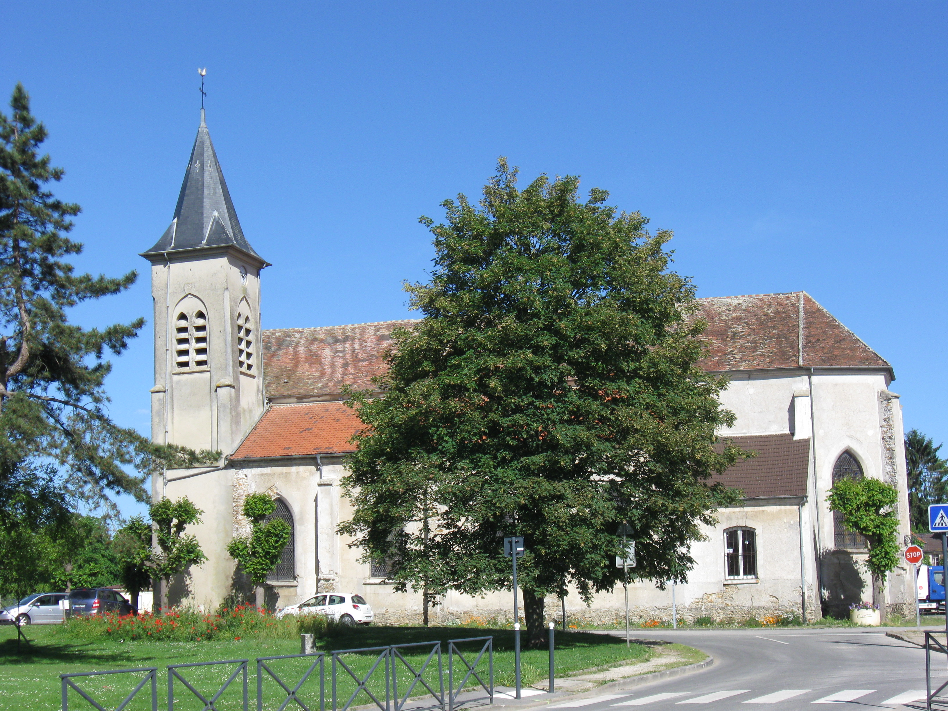 Église Saint-Barthélemy de Chauconin-Neufmontiers. (Seine-et-Marne, région Île-de-France).